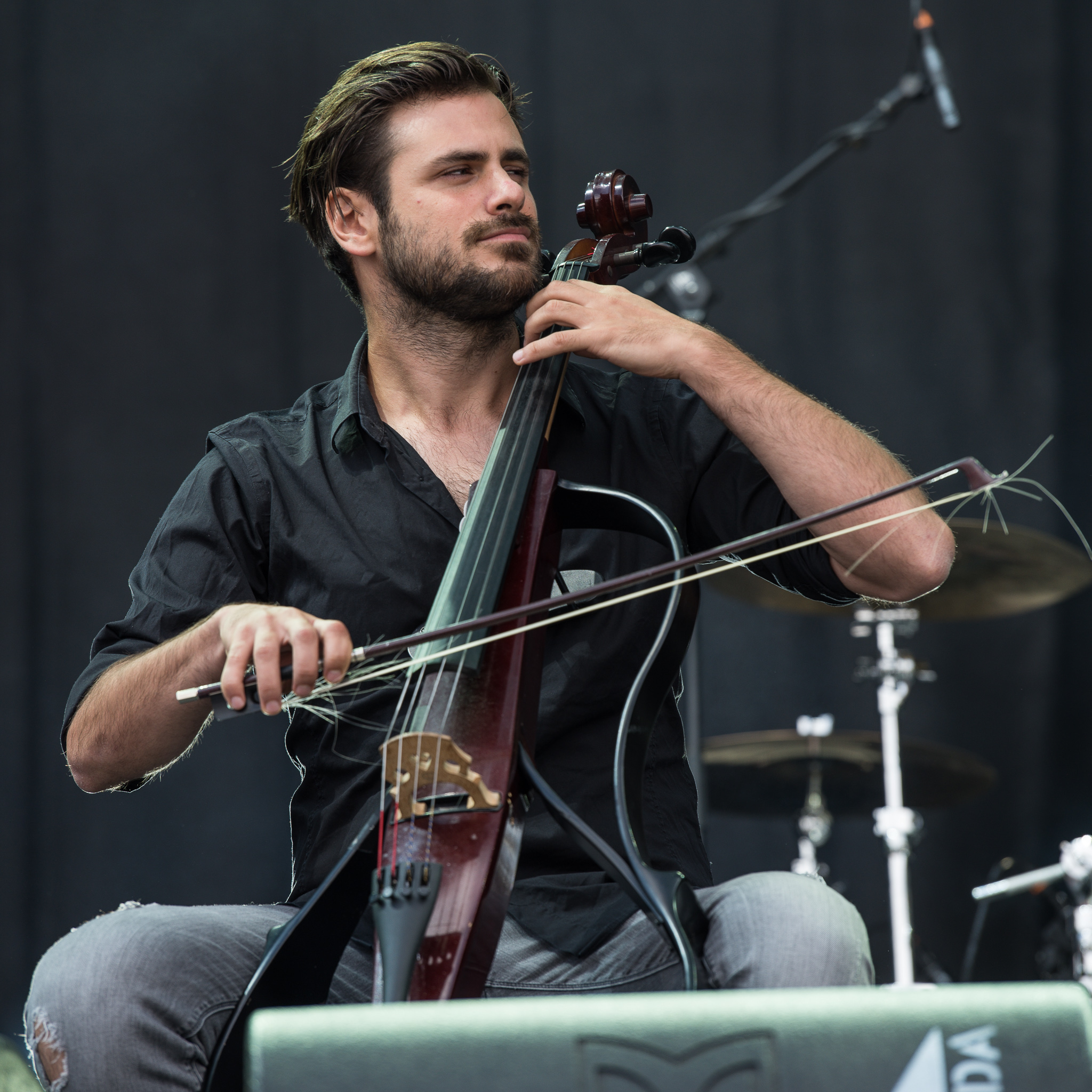 2Cellos,ARGO-Konzerte,Beck's Park Stage,Konzert,Livekonzert,Livemusik,Musik,RiP,Rock im Park 2017,Stjepan Hauser